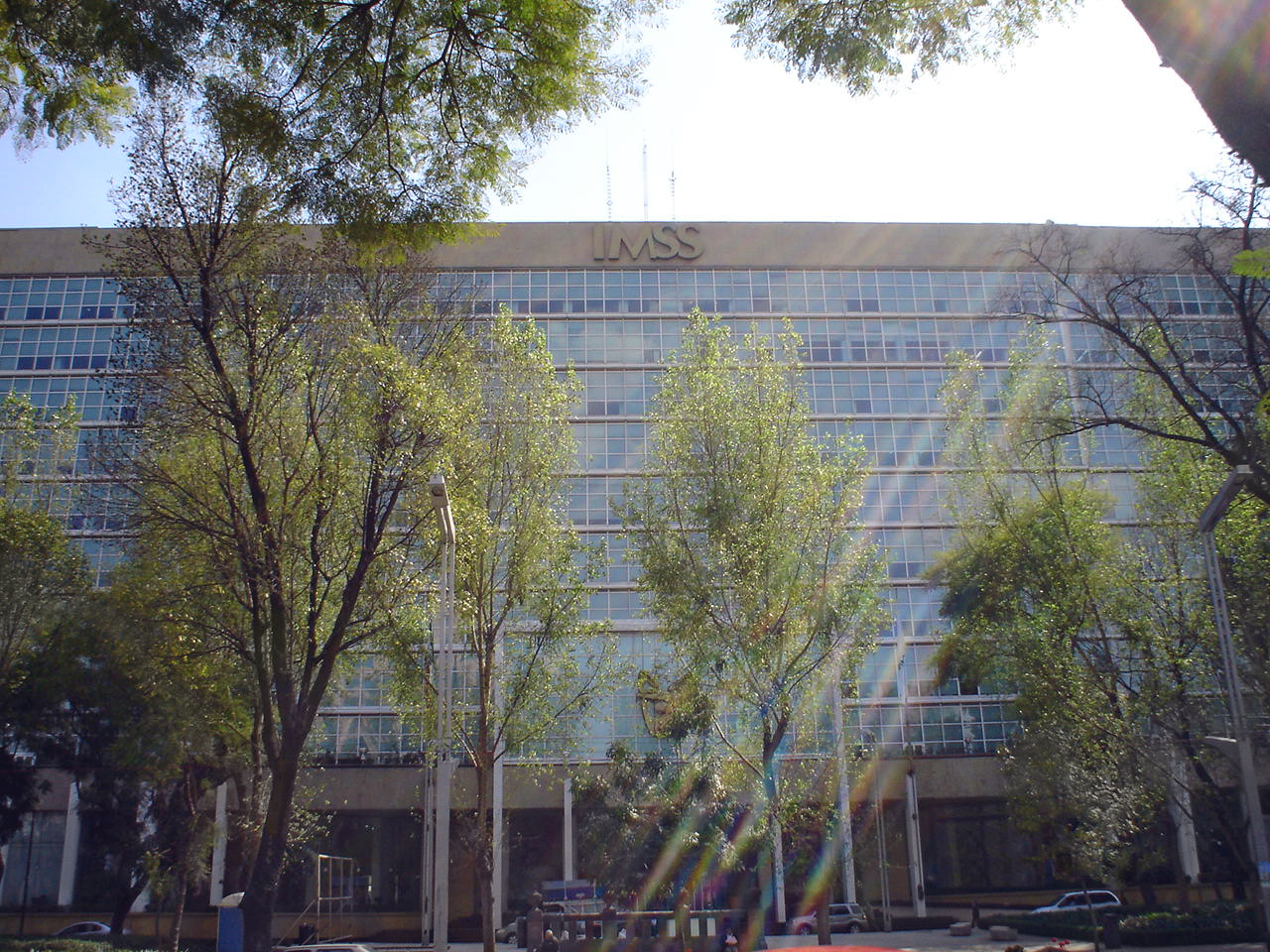 Oficinas centrales del Instituto Mexicano del Seguro Social en la Ciudad de México, D.F., México.